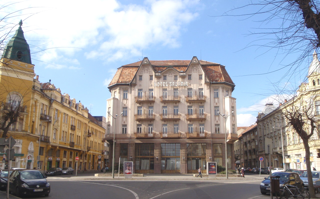 Savaria Nagyszálló Szombathelyen Savaria Szálló Cím: Szombathely, Király utca. A Széll Kálmán utca torkolatával